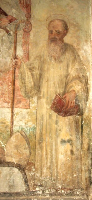 Gioacchino da Fiore, particolare affresco( 1573) Cattedrale di Santa Severina